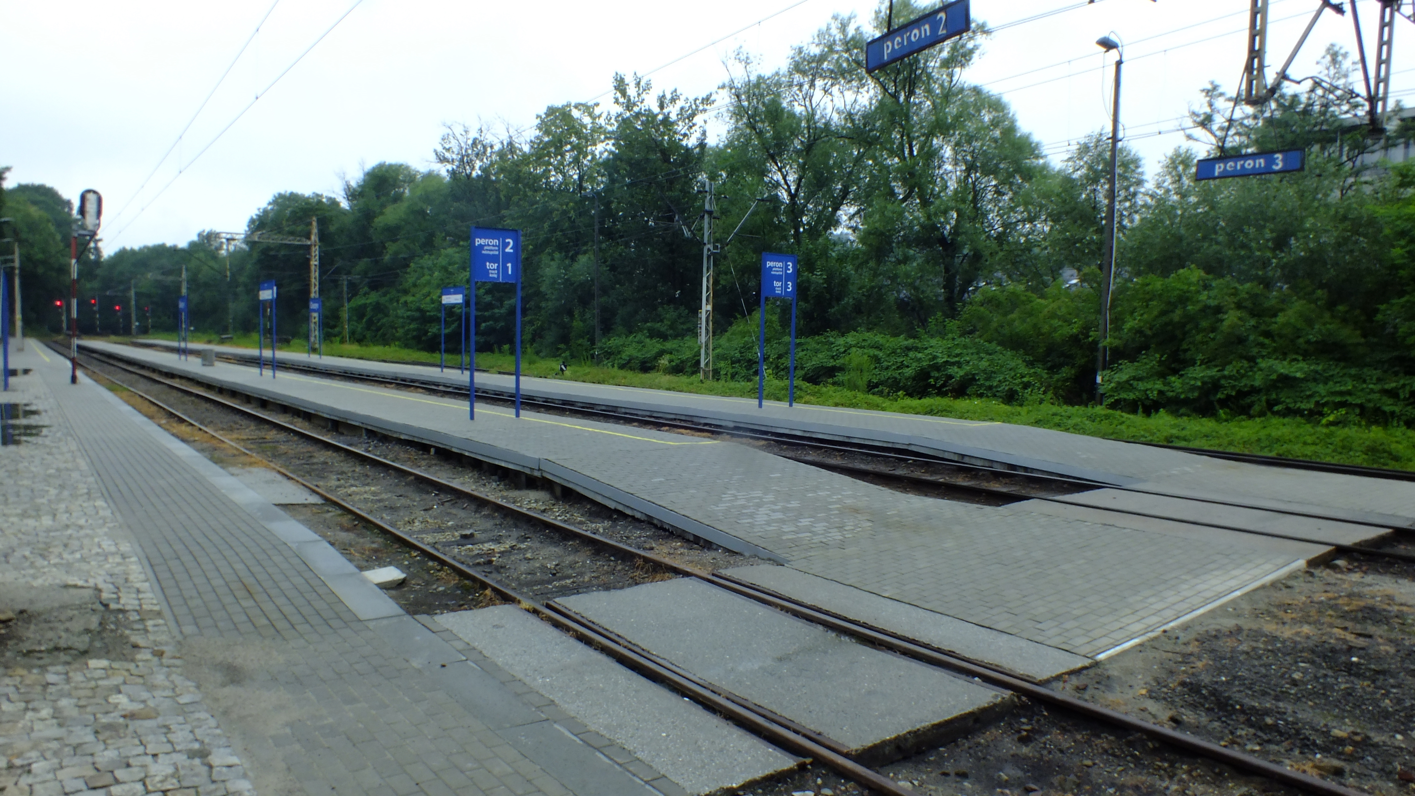 Stacja kolejowa w Cieszynie.